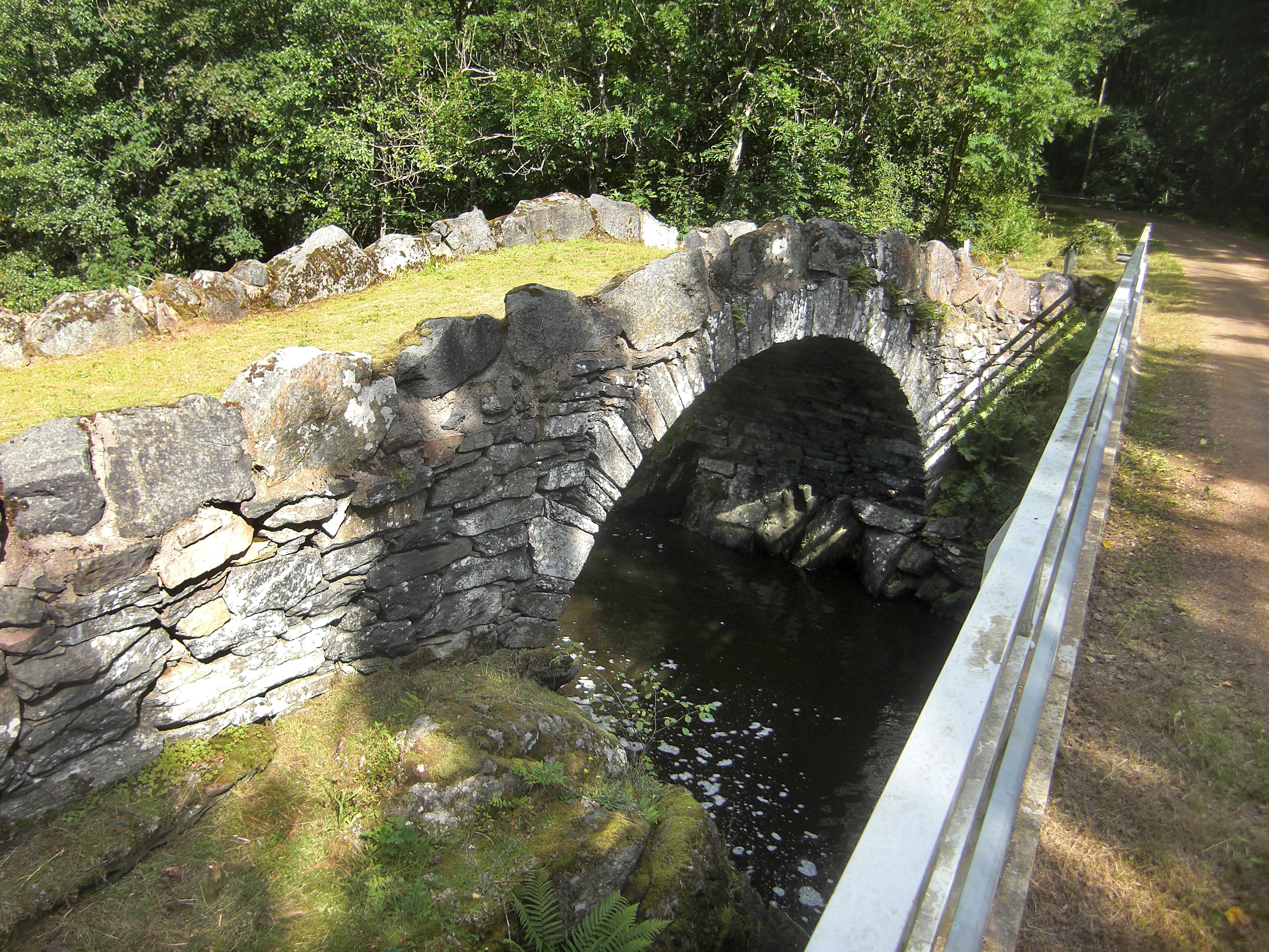 Stenvalvsbron över Lidan vid Kvissle (Raä-nr Trävattna 29:1) i Trävattna socken, Vilske härad, västligaste delen av Falköpings kommun, f.d. Skaraborgs län, Västergötland, Västra Götalands län, Sverige.